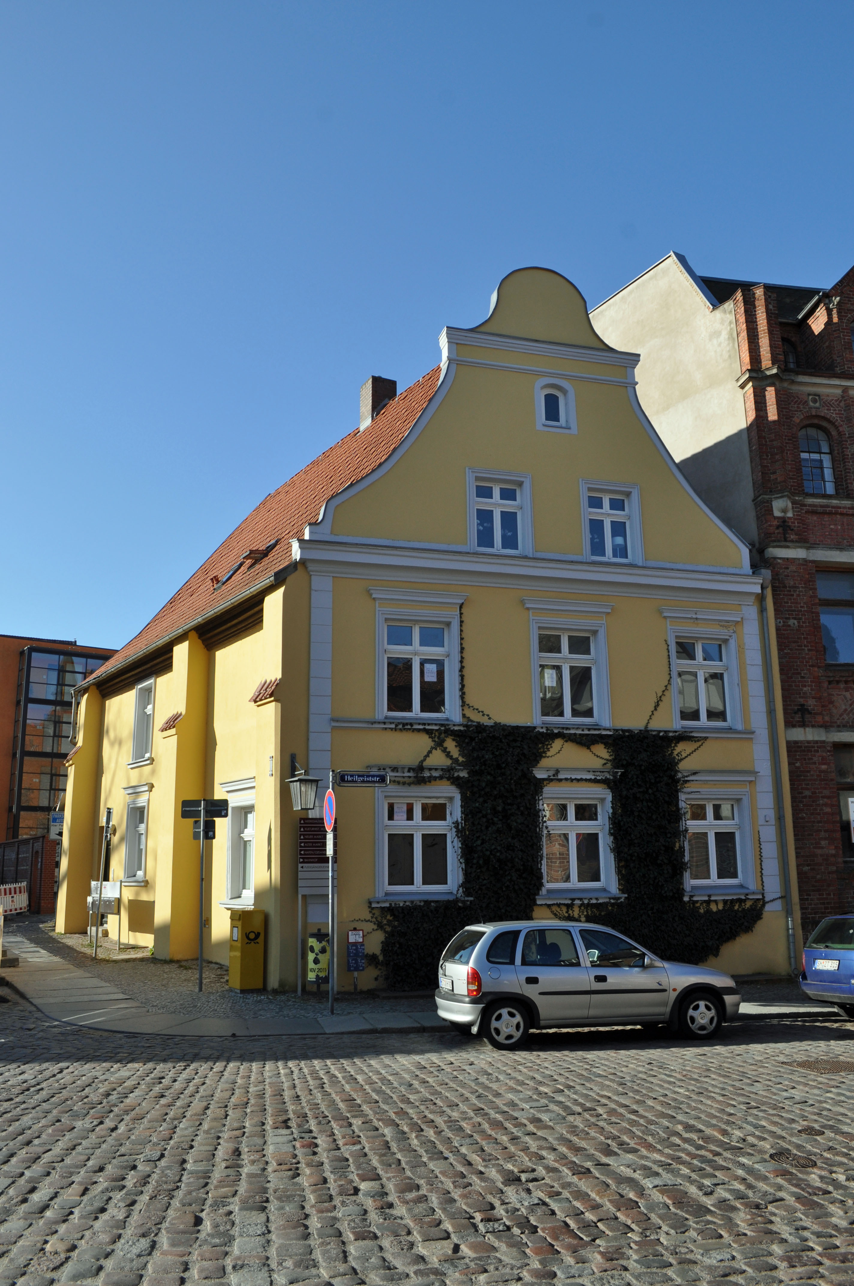 Gebäude bzw. Gebäudedetail in Stralsund. Straße und Hausnummer siehe Dateiname.